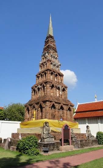 เจดีย์เชียงยัน วัดพระธาตุหริภุญชัย